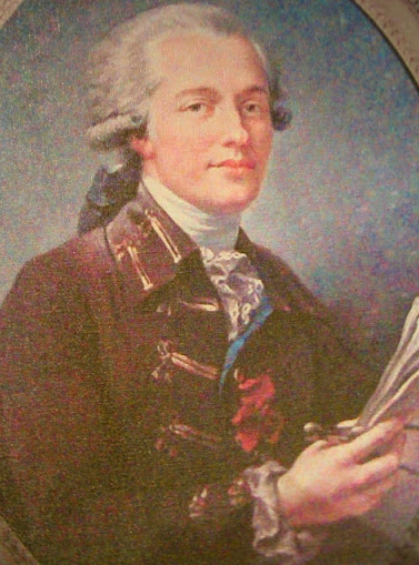 Gabriel de Solages